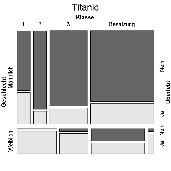 Mosaicplot